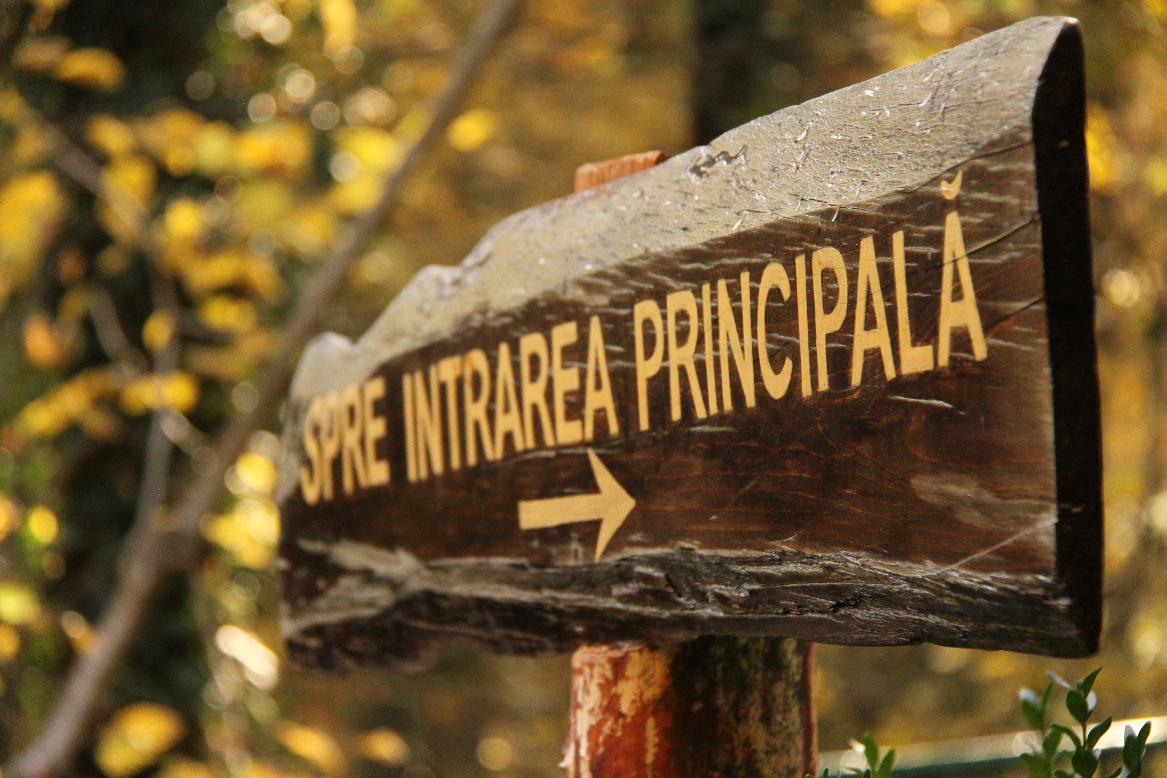 Autumn 2009